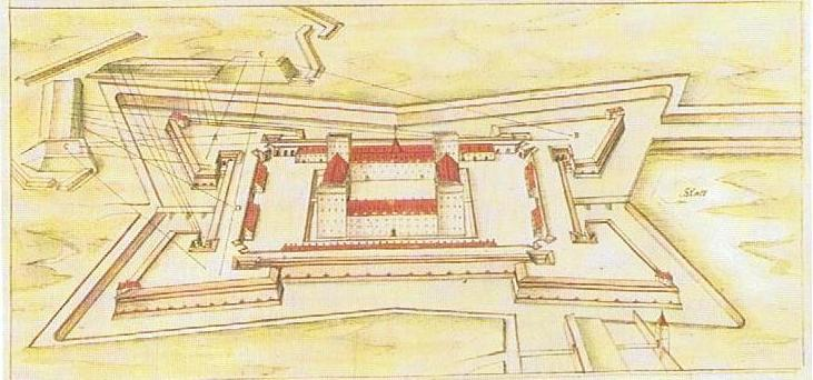 Zitadelle Jülich, perspektivische Ansicht Daniel Specklin